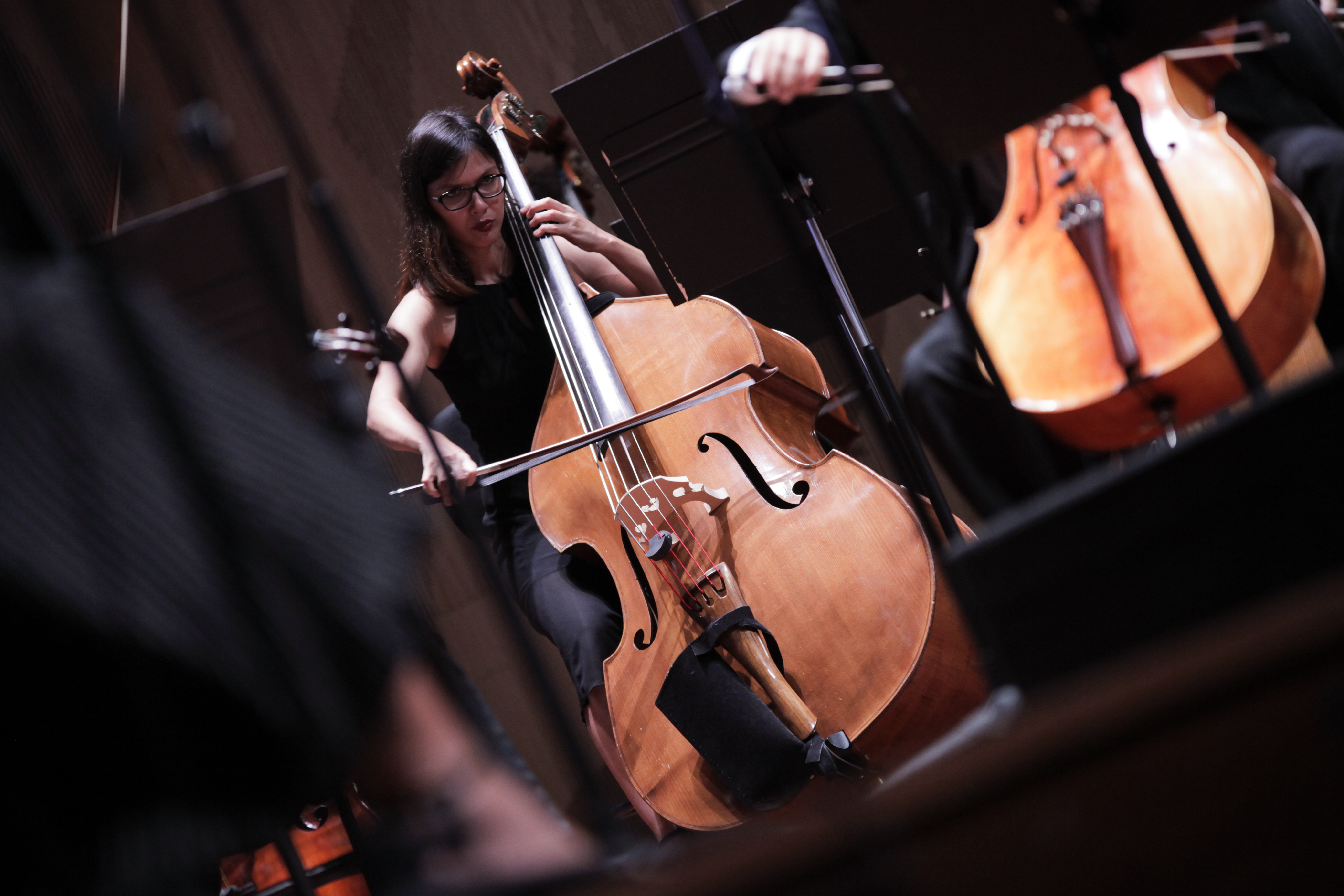 Orquestra Sinfônica Nacional. Regente Simone Menezes. Cenas da Paixão segundo Aleijadinho. Barítono solo Marcelo Coutinho. Foto: Janine Moraes/MinC